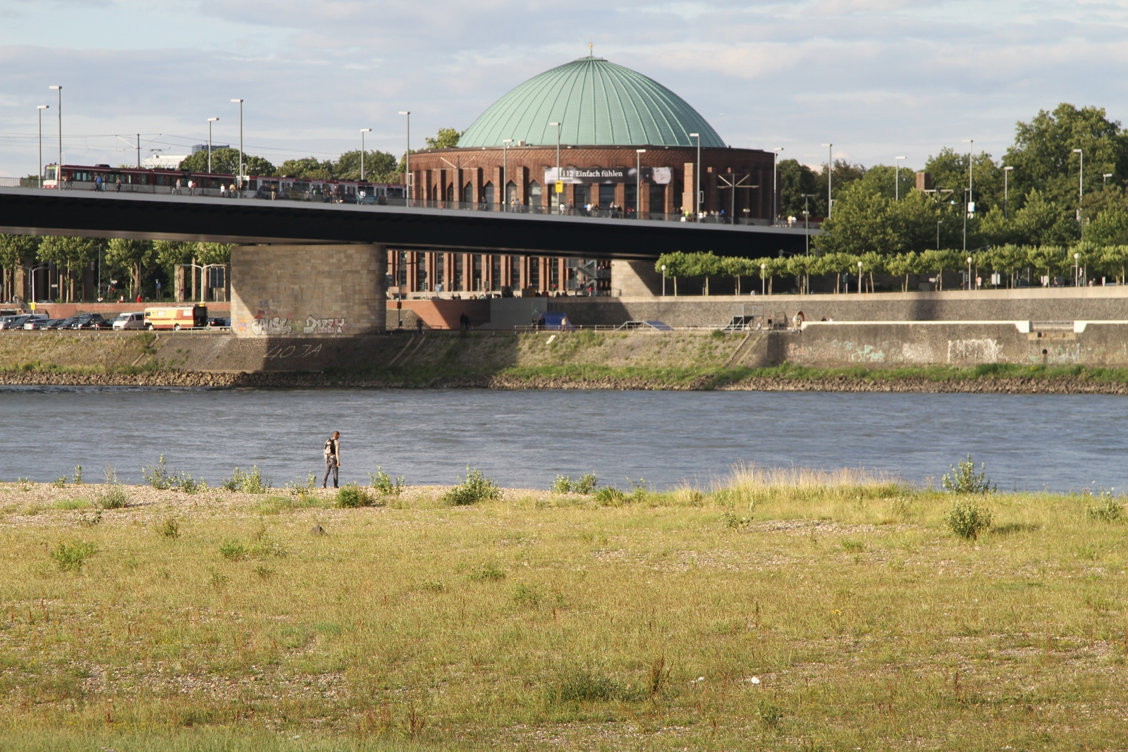 Tonhalle Düsseldorf, vom linksrheinischen Ufer aus gesehen